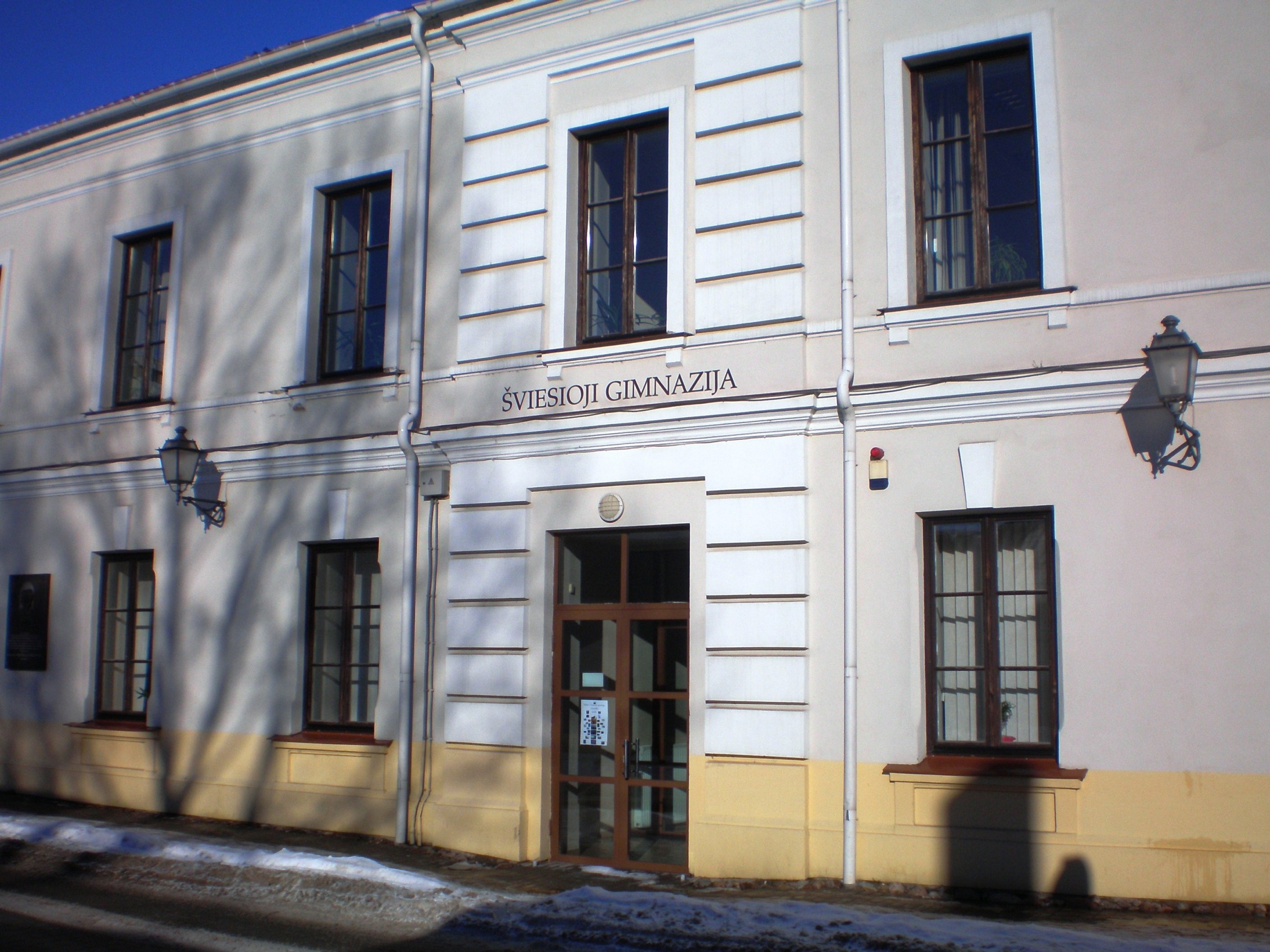 Kėdainių Šviesioji gimnazija. Pastatas Didžiojoje gatvėje